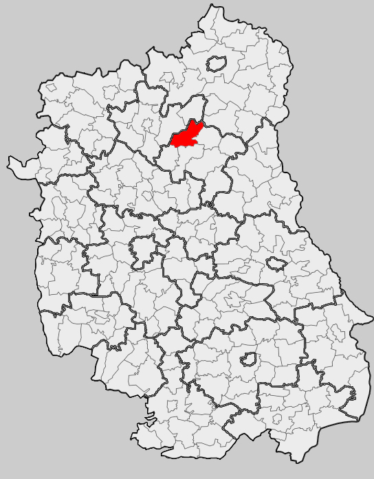 Map of gmina Milanów, Parczew county, Lublin voivodship Mapa gminy Milanów, powiat parczewski, województwo lubelskie